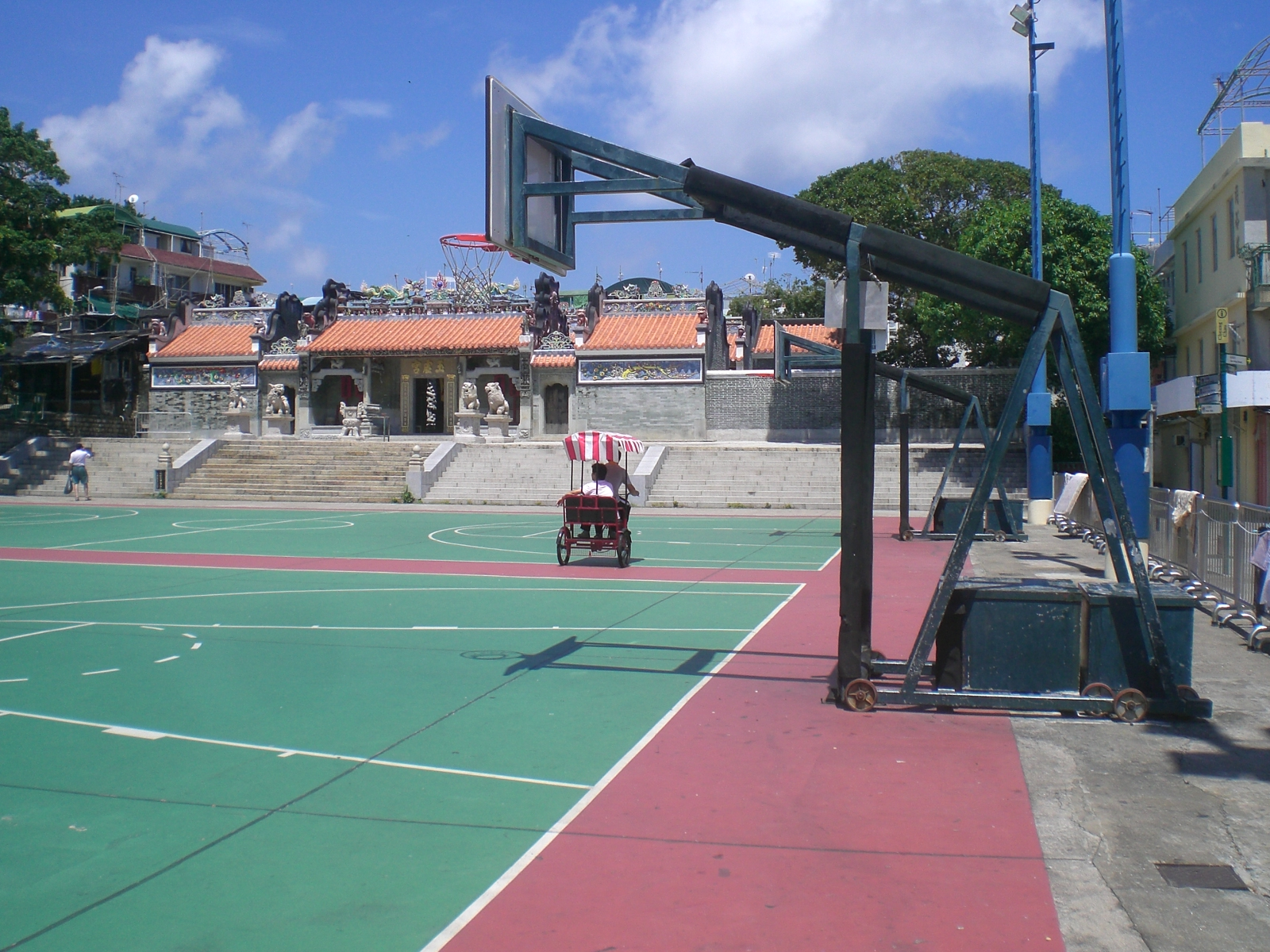 中文（香港）: 長洲玉虛宮，又名長洲北帝廟長洲北帝廟，正門前的籃球場及其它設施。